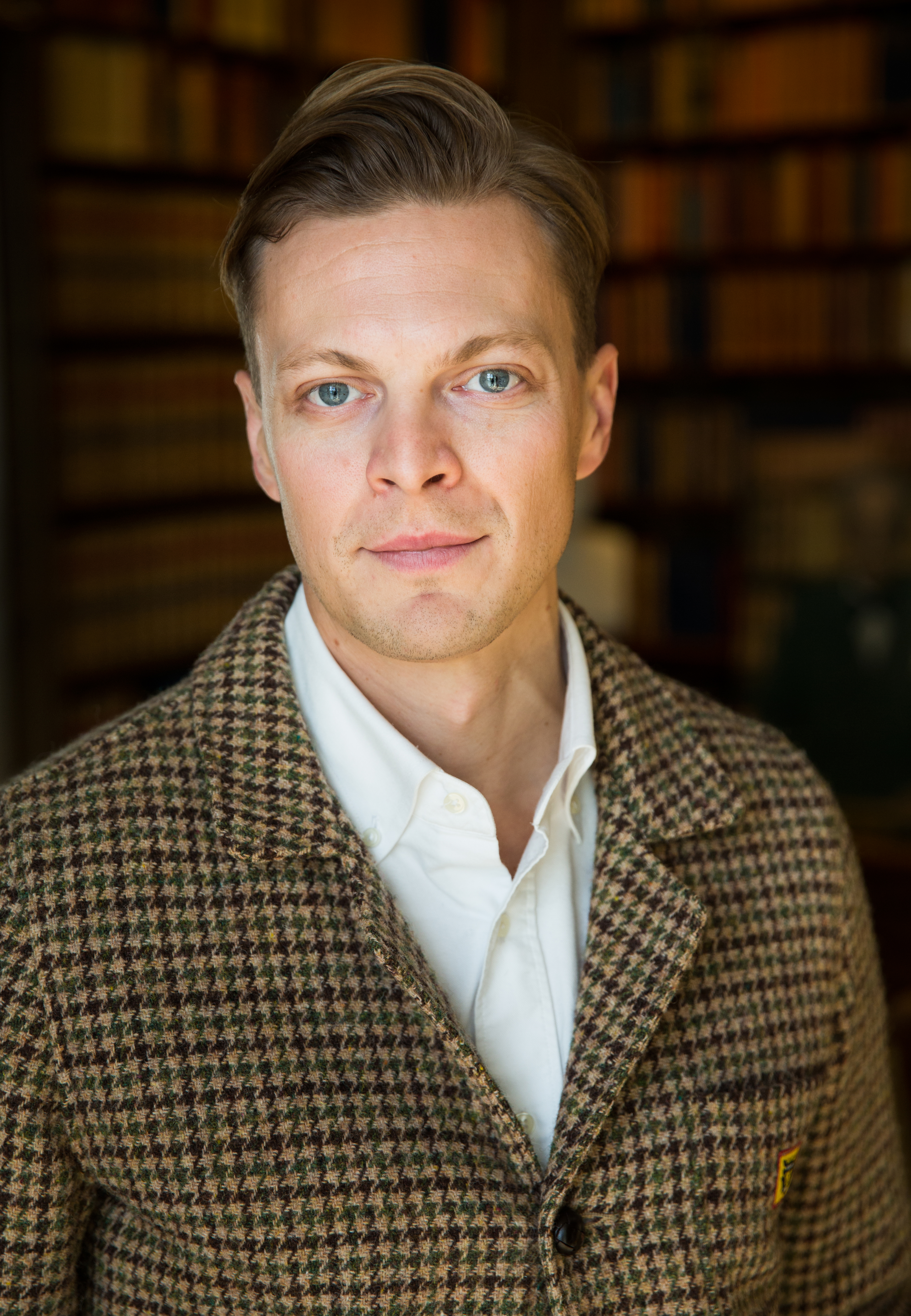 Journalisten och författaren Björn af Kleen.